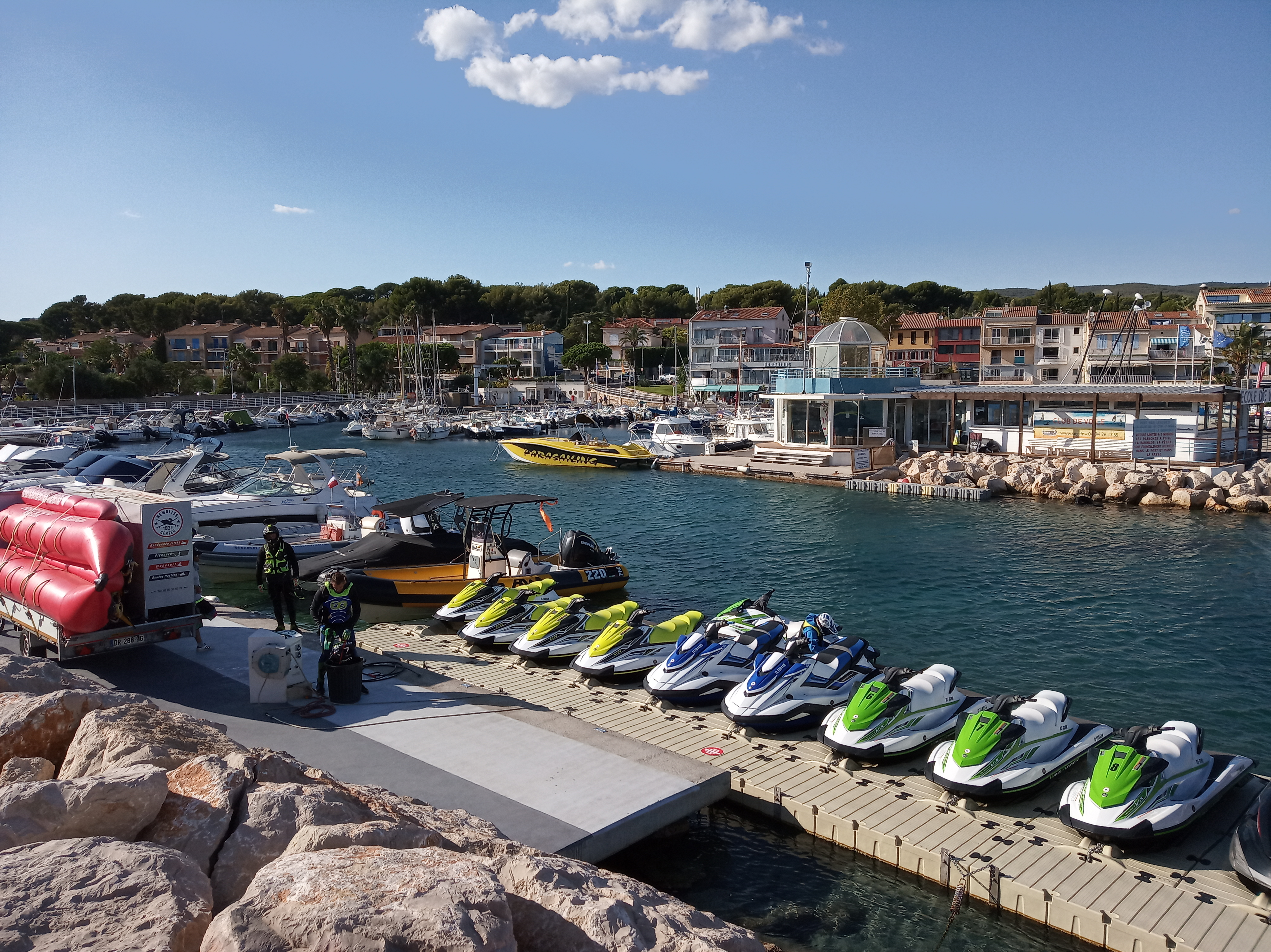 Přístav Les Lecques v Saint-Cyr-sur-Mer